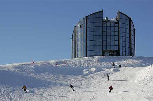 Leysin: Restaurant Tournant Kuklos (La Berneuse)